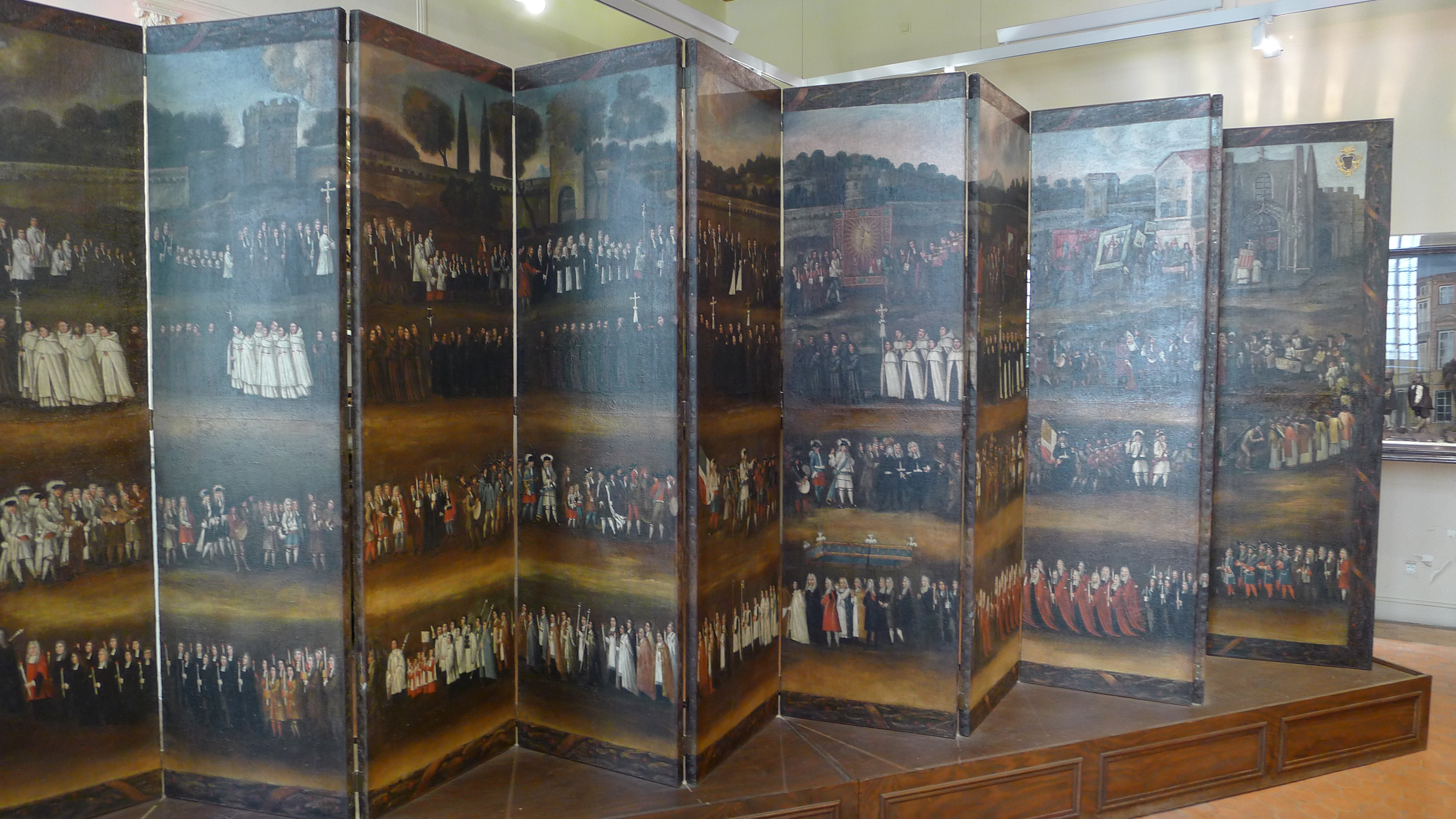 Paravent de la Fête-Dieu (XVIIIe siècle) exposé au musée du Vieil-Aix situé à Aix-en-Provence dans l'hôtel d'Estienne-de-Saint-Jean.